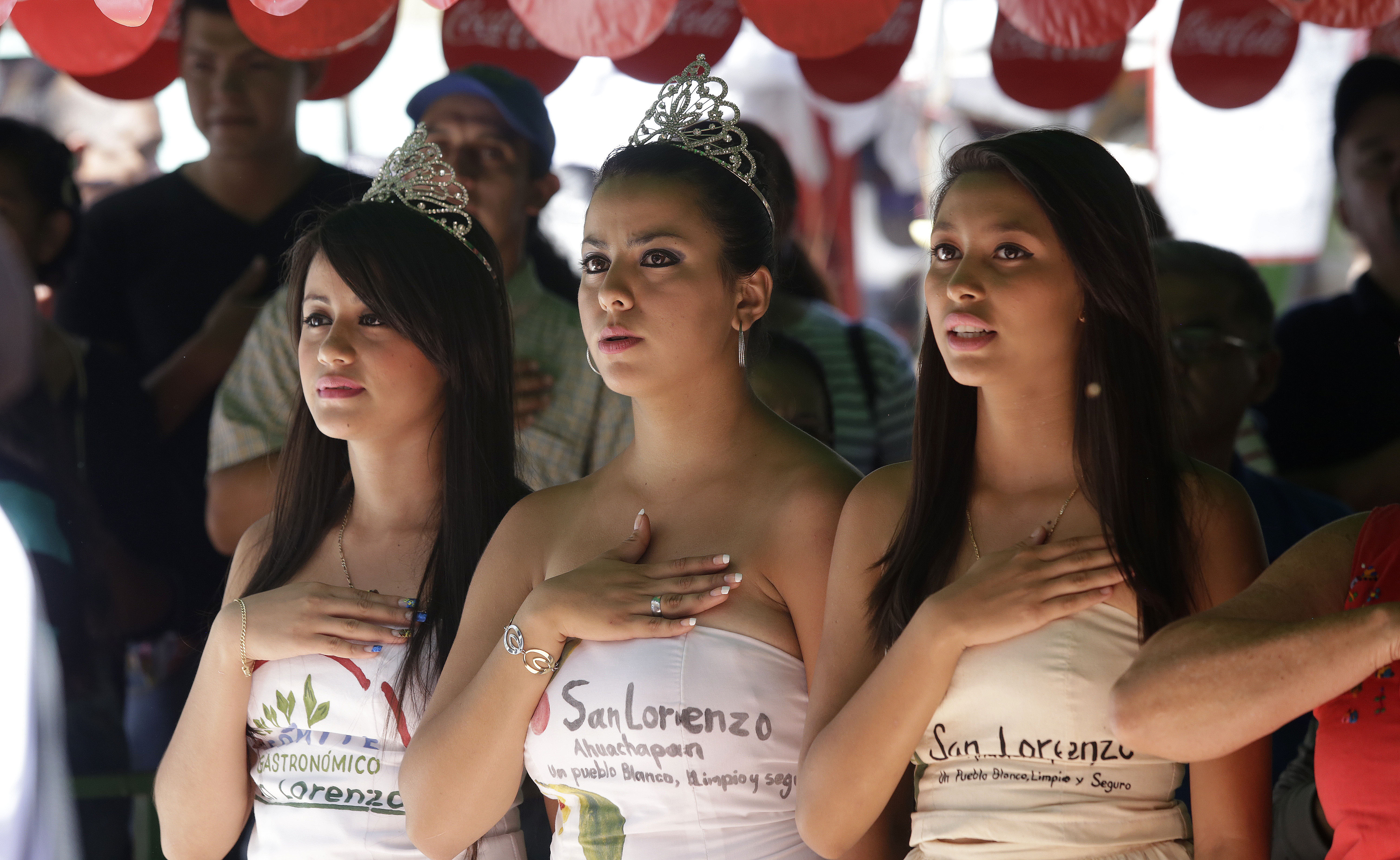 Quinto Festival del Jocote, Barón Rojo 2016 , San Lorenzo , Ahuachapán. Asistentes al evento.